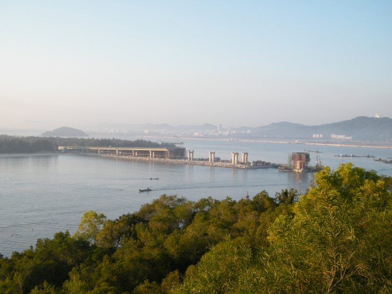 中文（中国大陆）: 在建的河渡大桥2013年2月